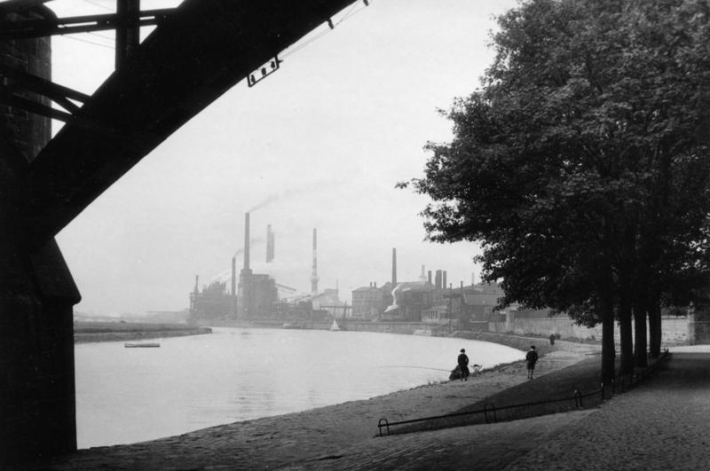 Mülheim / Ruhr - Partie a. d. Ruhr Aufn.: Illus / Brenner Br.-Nr. 29/18 3066-49